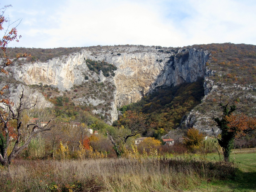 Plezališče Osp